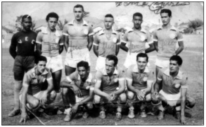 Vila Esporte Clube - 1950